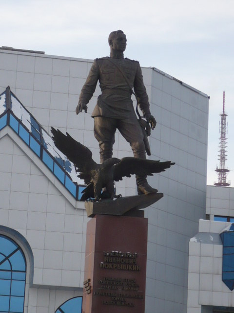 Monumento al Pokriŝkin ĉe la placo Marks en Novosibirsko.